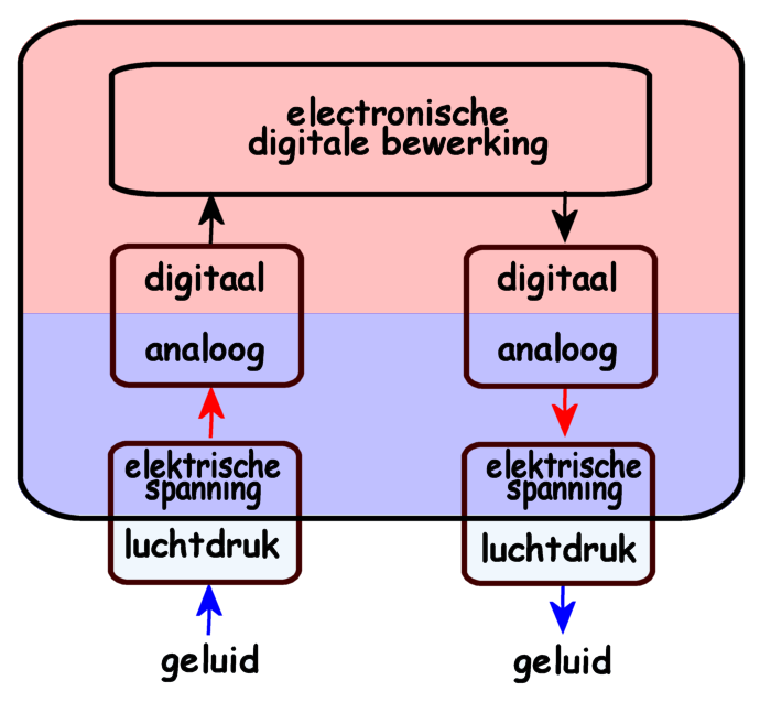 minimaaal digitaal bewerkingssysteem